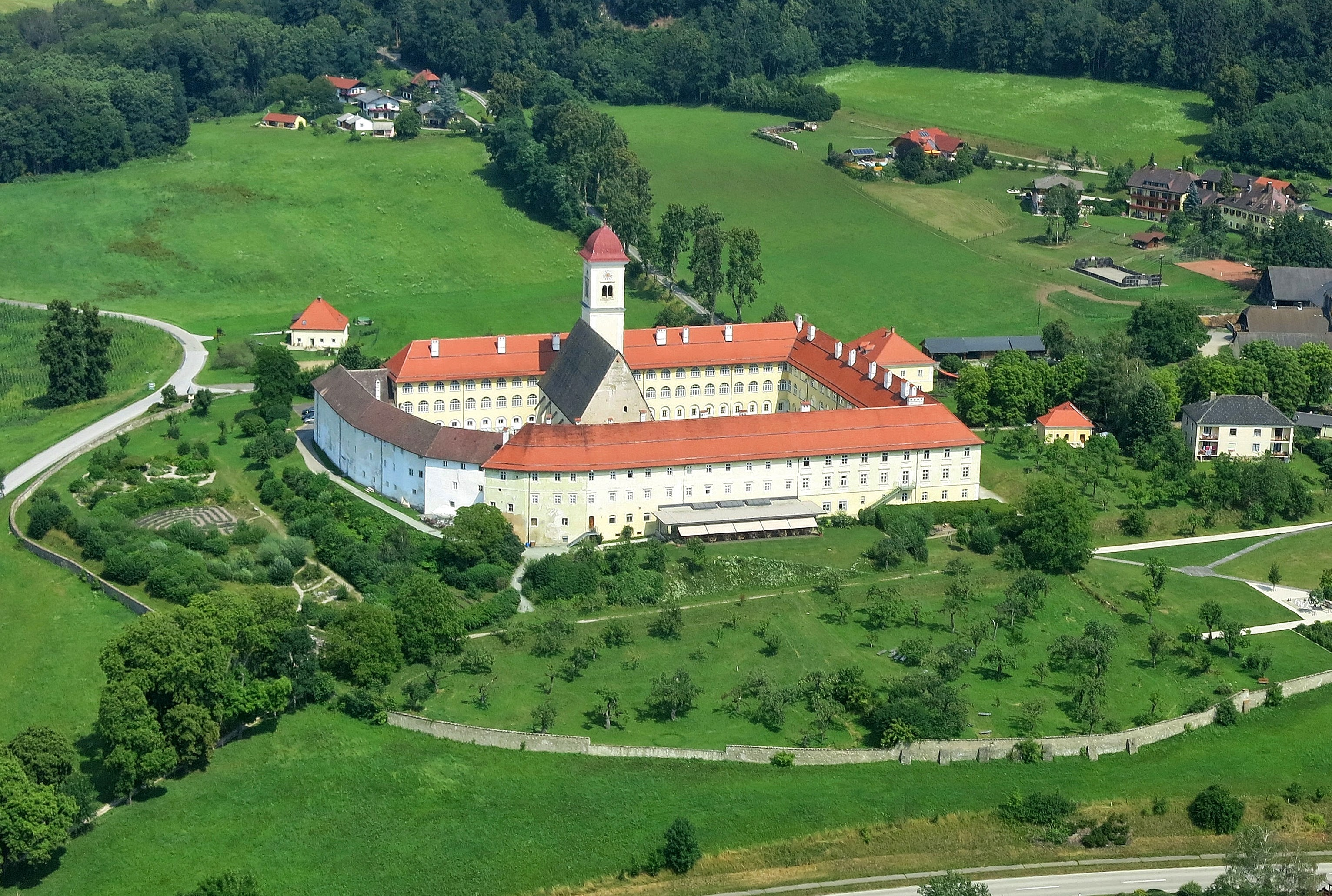 Ehem. Benediktinerinnenklosteraus dem 12.Jh.,1783 aufgehoben, seit 1959 Schulstandort bzw. Bildungshaus, Hotel, Seminarzentrum der Diozöse Gurk, archäologisches Fundhoffnungsgebiet